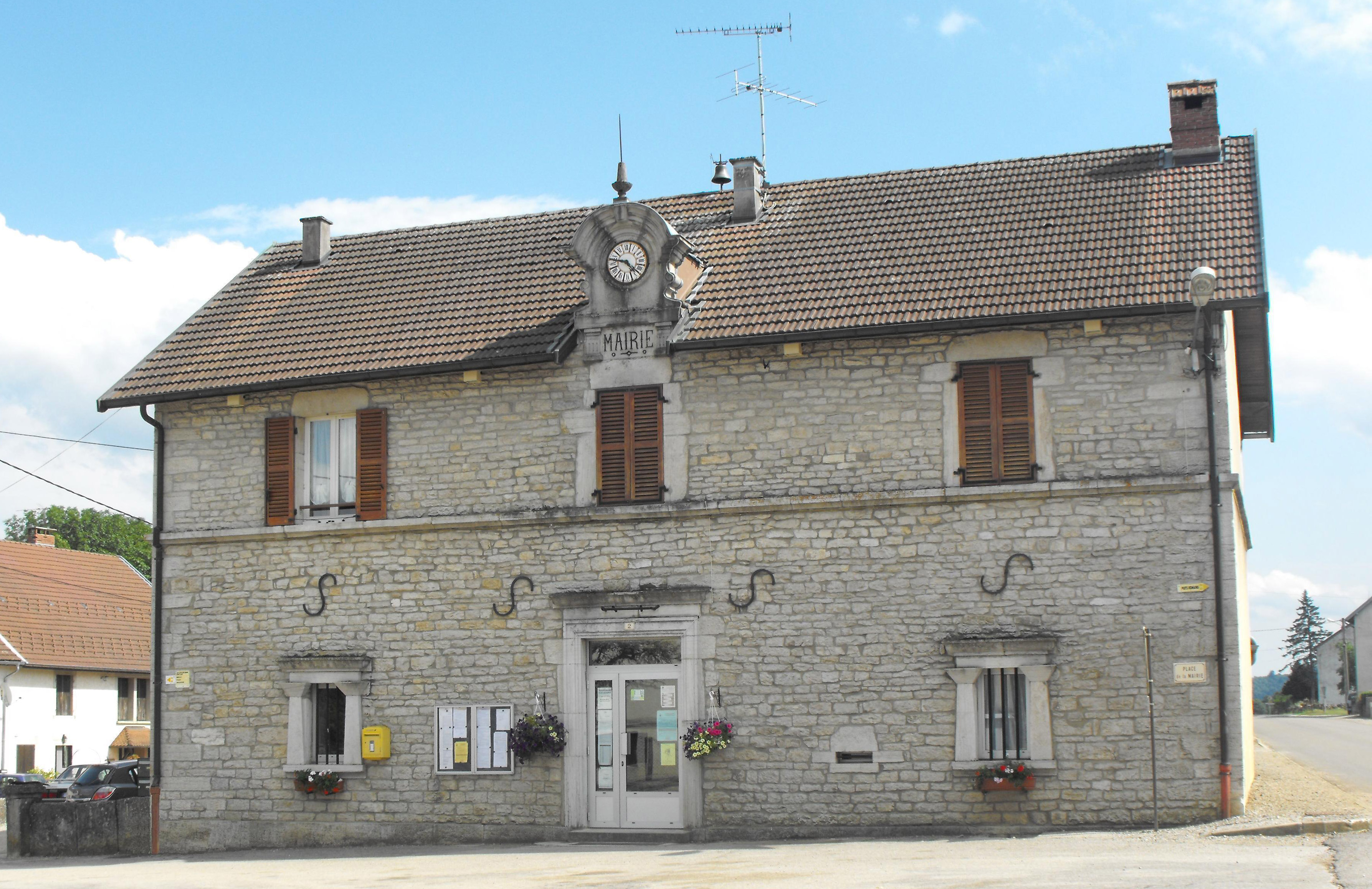 Photo PB personnelle